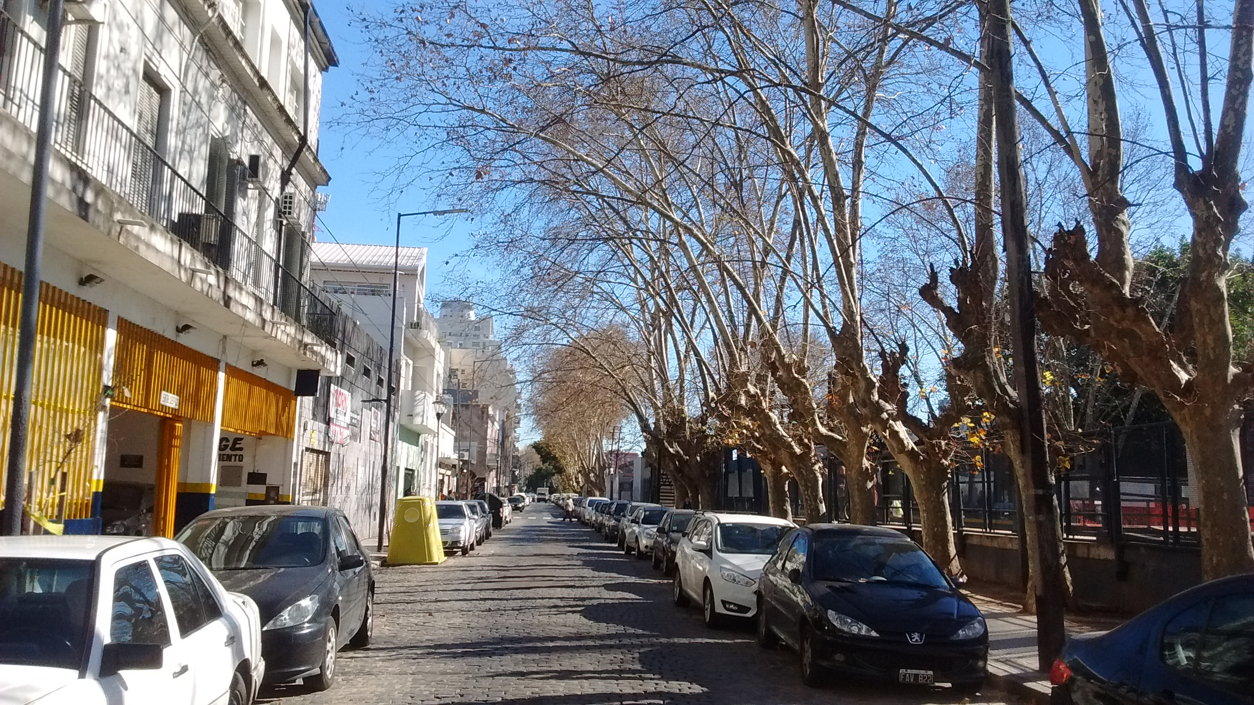 Avenida Crámer al 400, entre Federico Lacroze y Teodoro García. Buenos Aires, Argentina. Mirando al norte.